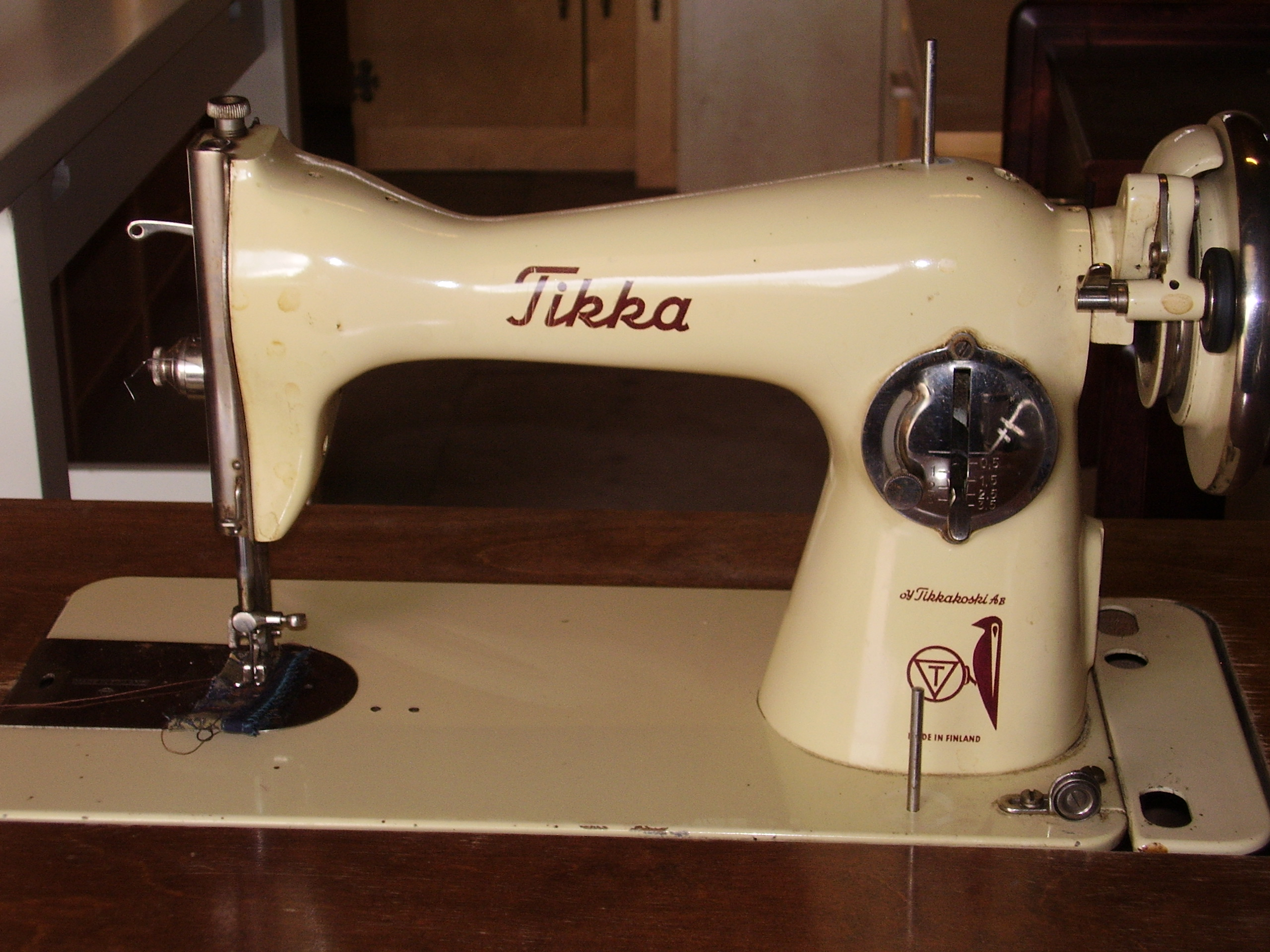 Tikka ompelukone vuodelta 1951.